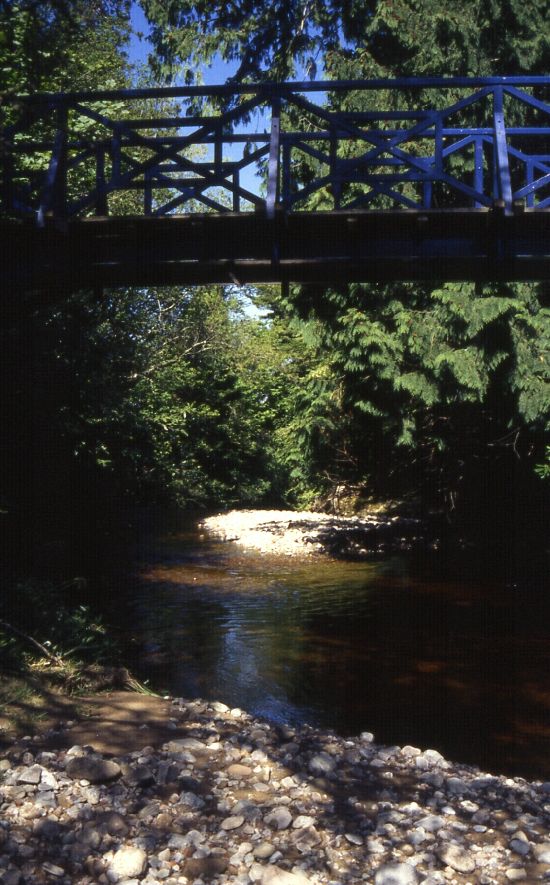 River Dee beim Balmor Castle